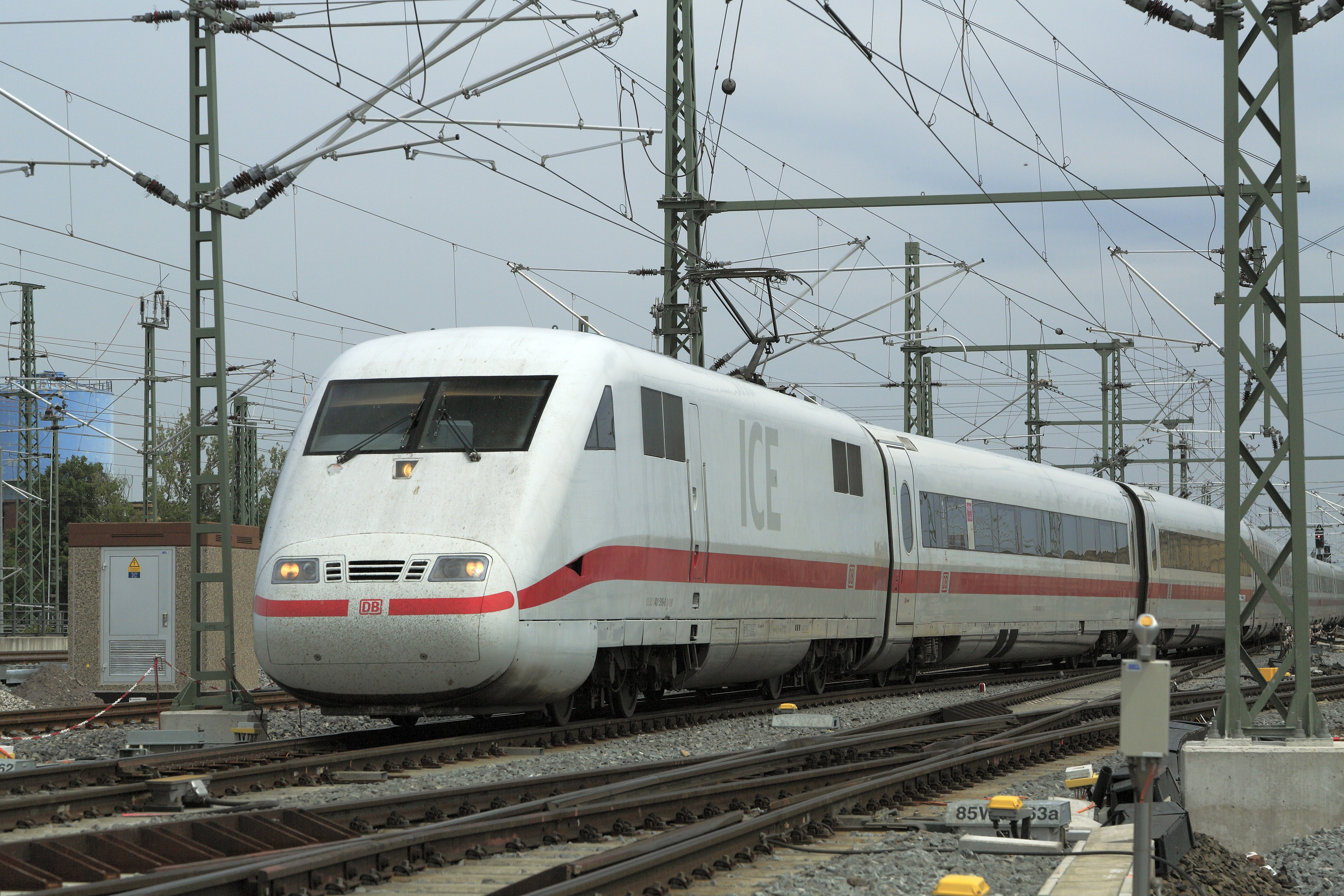 ICE-1-Triebzug bei der Einfahrt aus Richtung Berlin. Erst, seitdem diese Einheiten durch die Indienststellung der neueren 403, 406 und 407 keinen Paradepferdstratus haben, werden sie auch auf den Strecken durch den mitteldeutschen Raum eingesetzt.